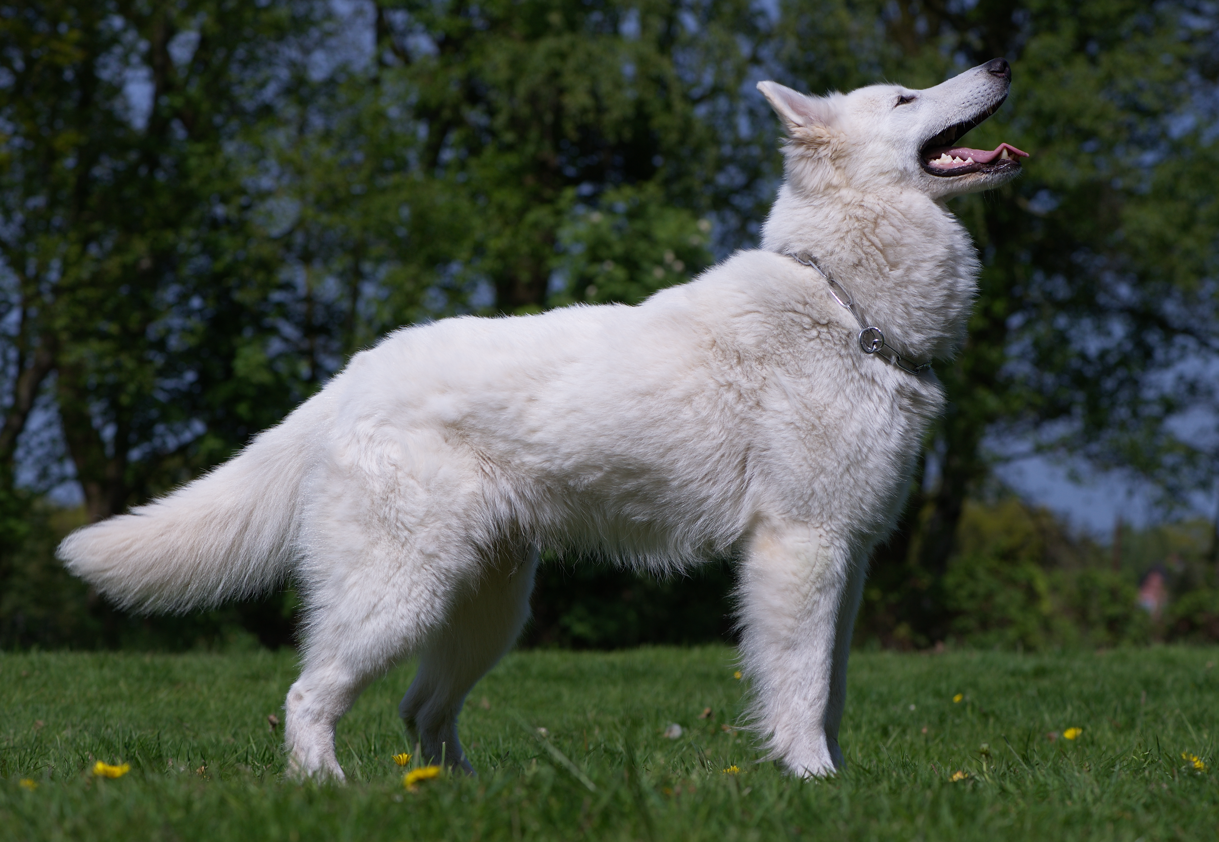 Weißer schweizer Schäferhund